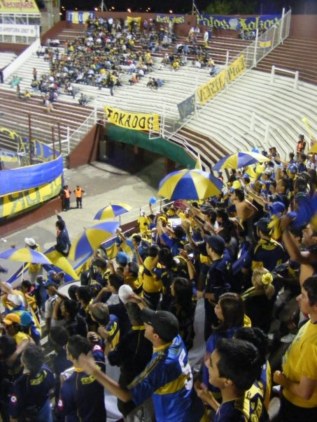 Barra Los del Cerro Buenos Aires Argentina